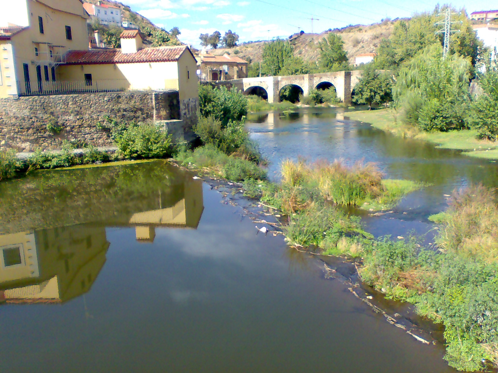 Río Jerte a su paso por Plasencia